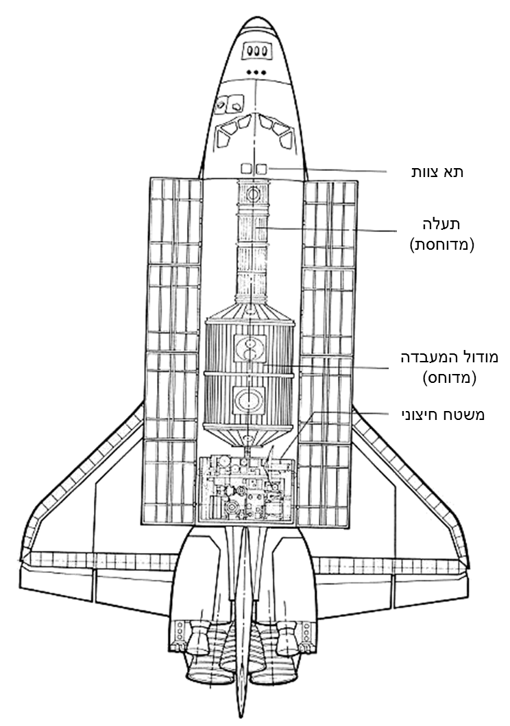 תרשים בעברית של ספייסלאב